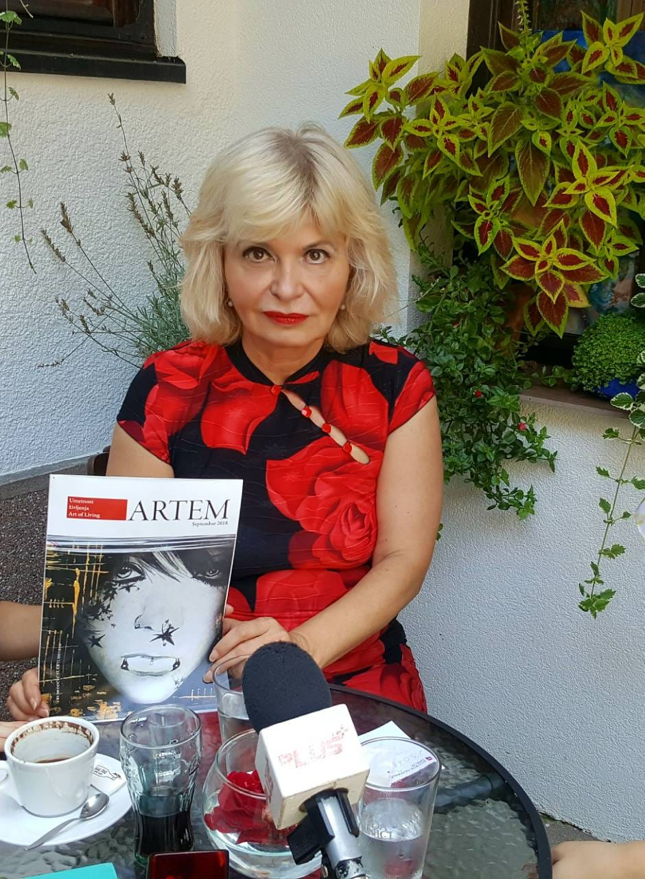 Светлана